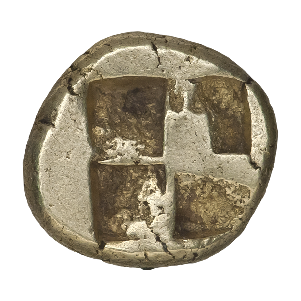 Мизия. Кизик. Гекта (1/6 статера). Ок. 500—475 гг. до н.э. Реверс. Вдавленный квадрат (инкуз), разделенный на четыре части.